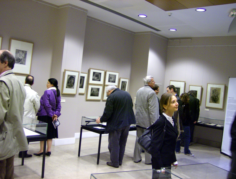 Exposition des estampes de Johnny Friedlaender (1912-1992) à l'Institut national d'histoire de l'art, Galerie Colbert, à Paris en 2008